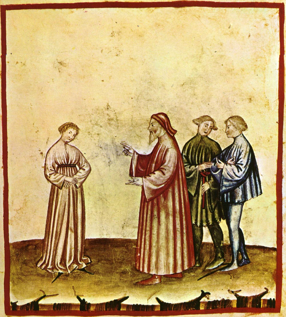 Tacuina sanitatis (XIV century) 6-aspetti di vita quotidiana, discrezione,Taccuino Sanitati